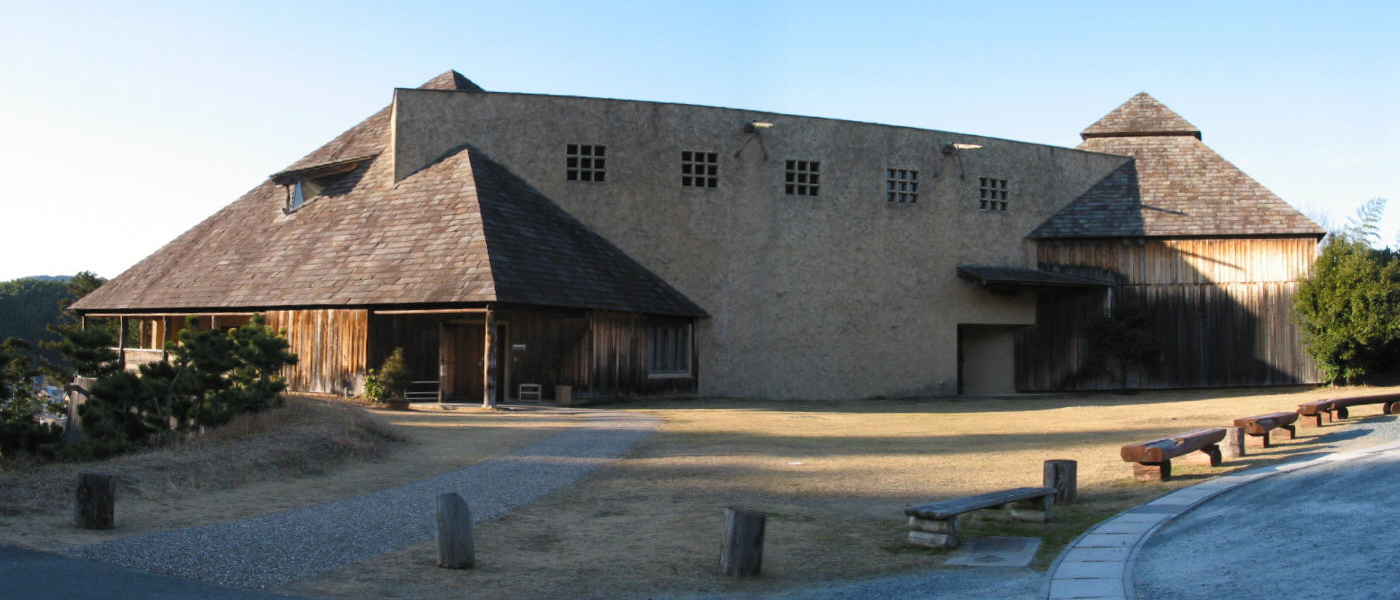 Hamamatsu City AKINO Fuku Museum 浜松市秋野不矩美術館外観静岡県浜松市天竜区二俣町二俣で撮影